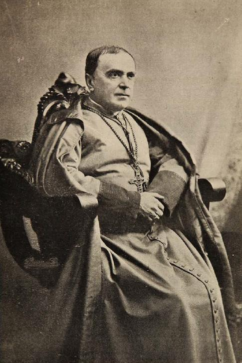 Monseñor Mariano Casanova y Casanova (* Santiago, Chile, 25 de julio de 1833 - † 16 de mayo de 1908) fue el cuarto Arzobispo de Santiago de Chile (1886-1908).